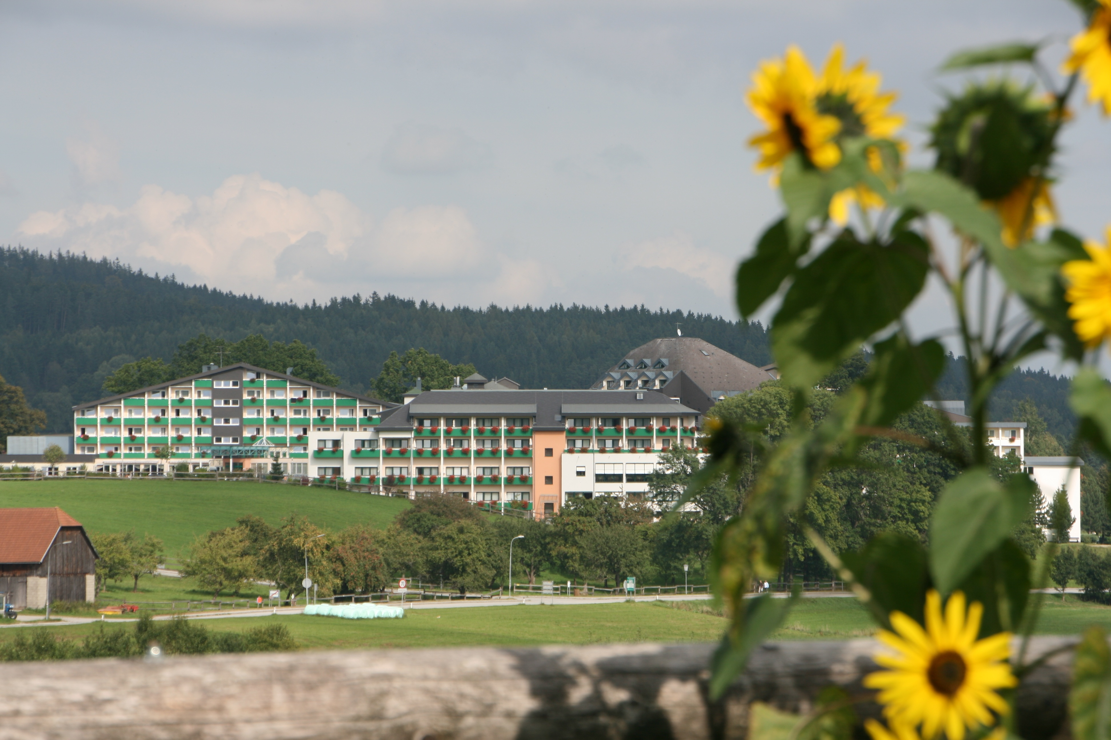 Sonnenblumen